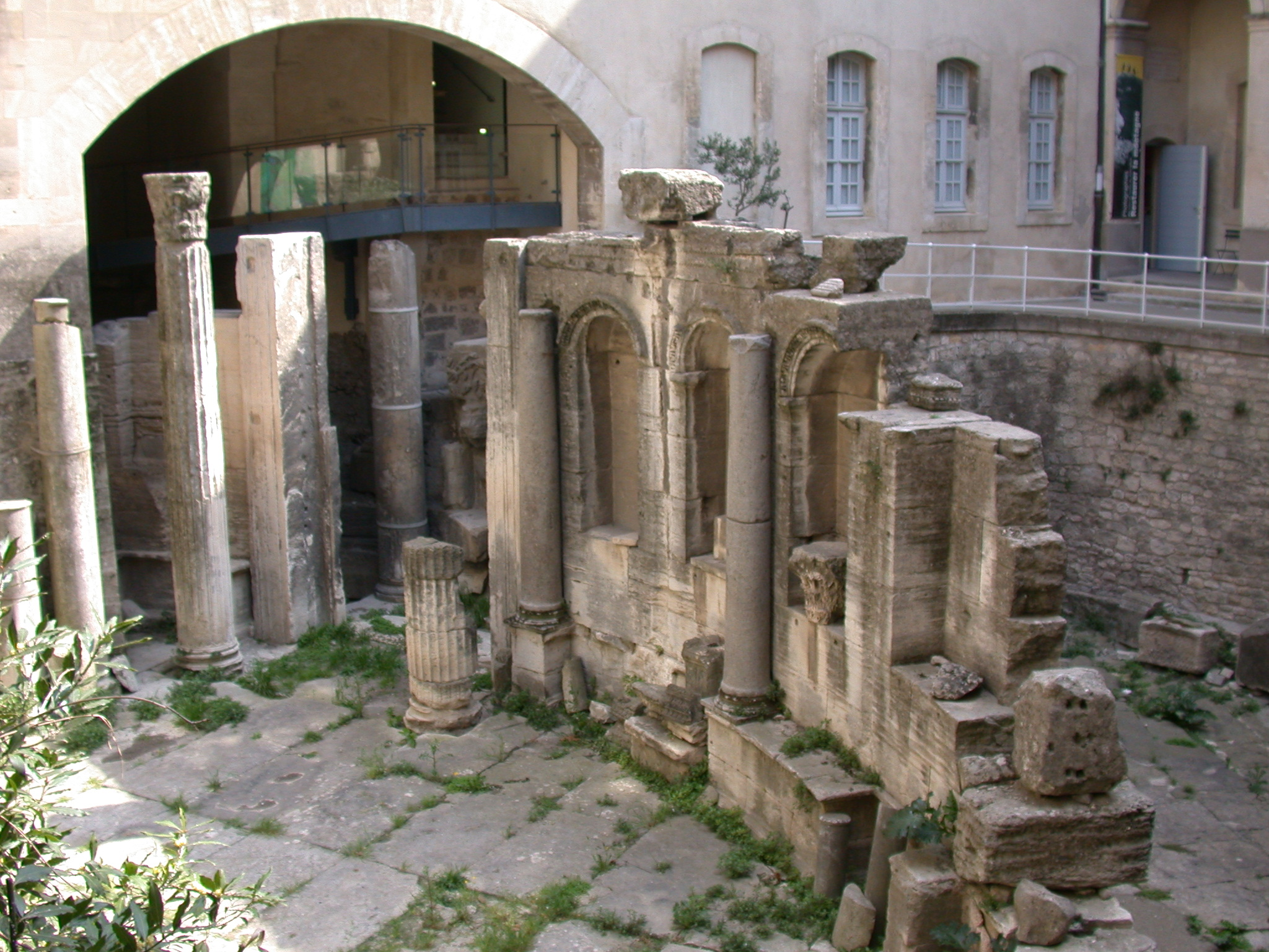 Arles (Francia), resti dell'esedra all'estremità di una piazza annessa al Foro romano, nel cortile del Muséon Arlaten (hôtel de Laval-Castellane). Foto personale aprile 2005